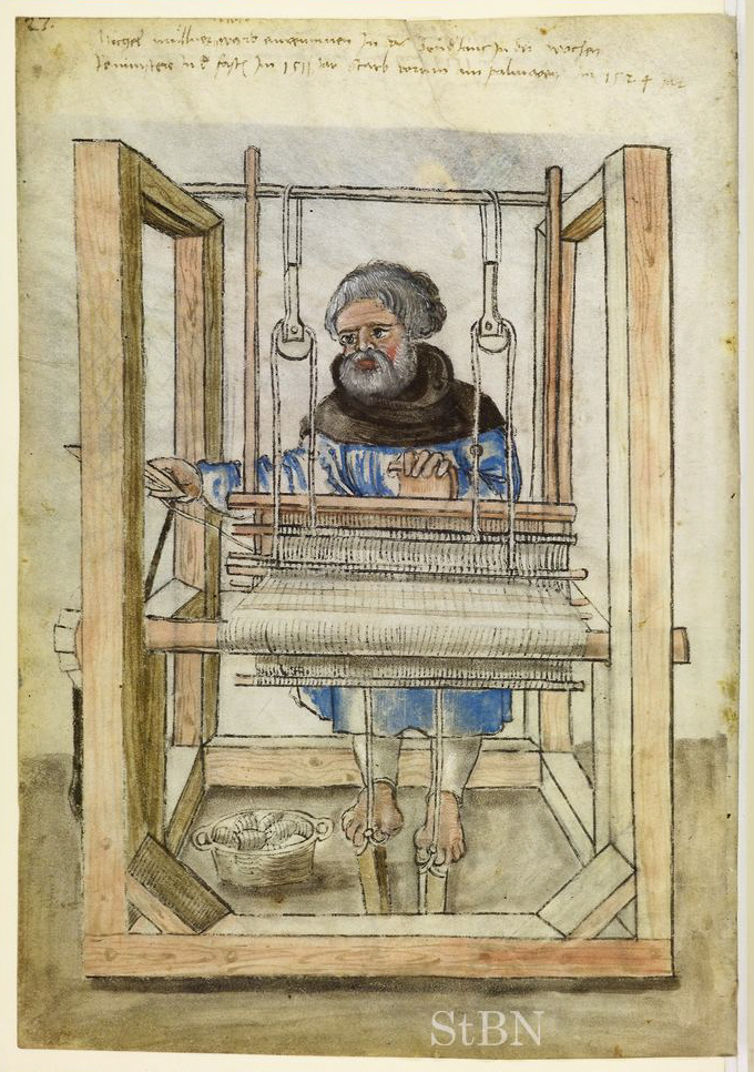 Transkription und weitere Informationen Michel (Michael) müllner (Müllner), Weber